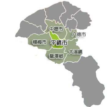 平鎮市行政區劃